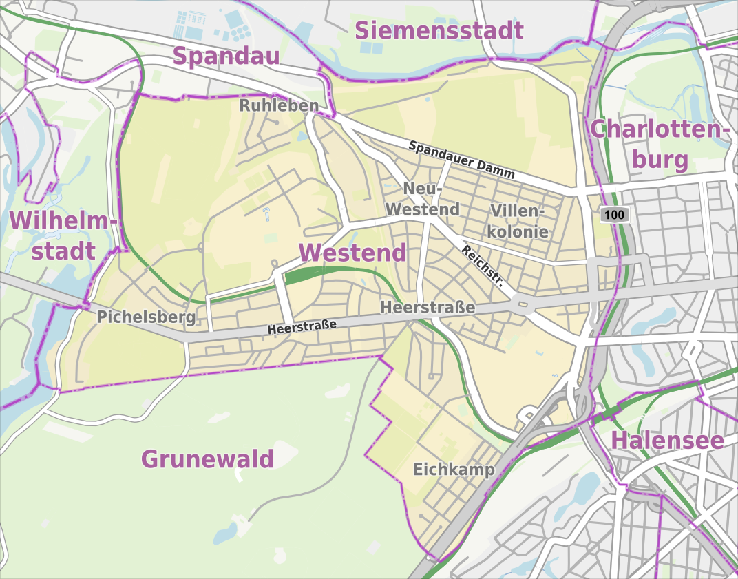 Übersichtskarte der Straßen und Ortslagen in Berlin-Westend